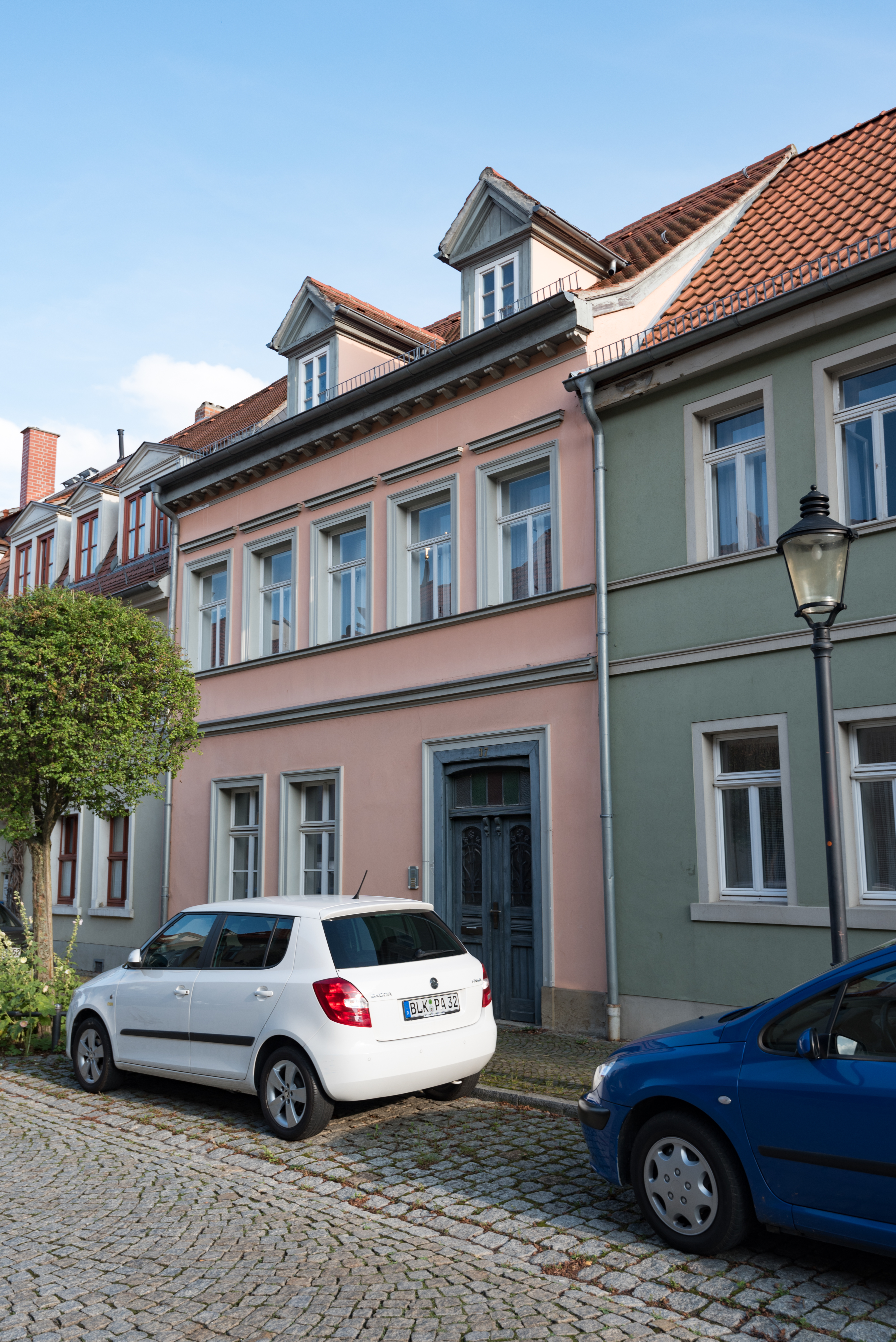 Naumburg (Saale), Neustraße 37